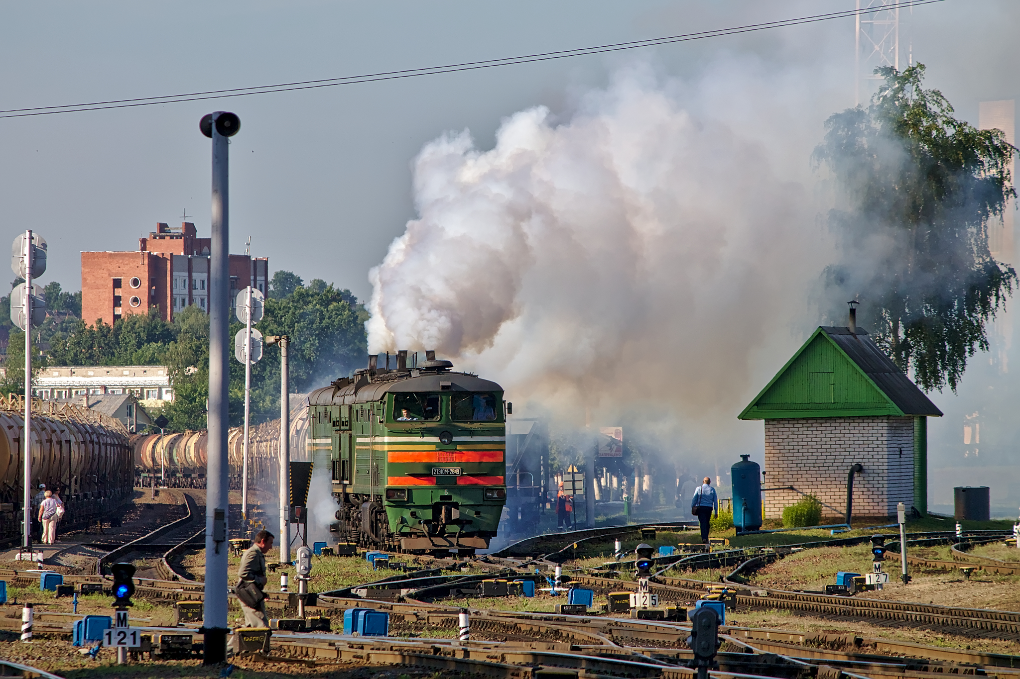 2ТЭ10М-2849. см. фото 600443 в альбоме автора